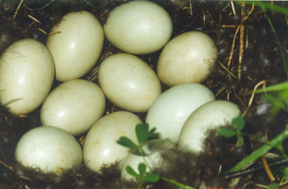 Didžiosios anties (Anas platyrhynchos) dėtis